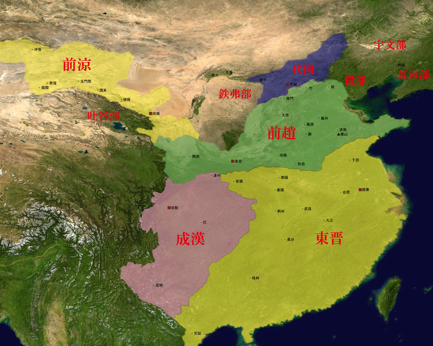 五胡十六国時代の前趙、東晋、成漢、前涼、代国の領域。